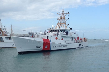 USCGC Isaac Mayo